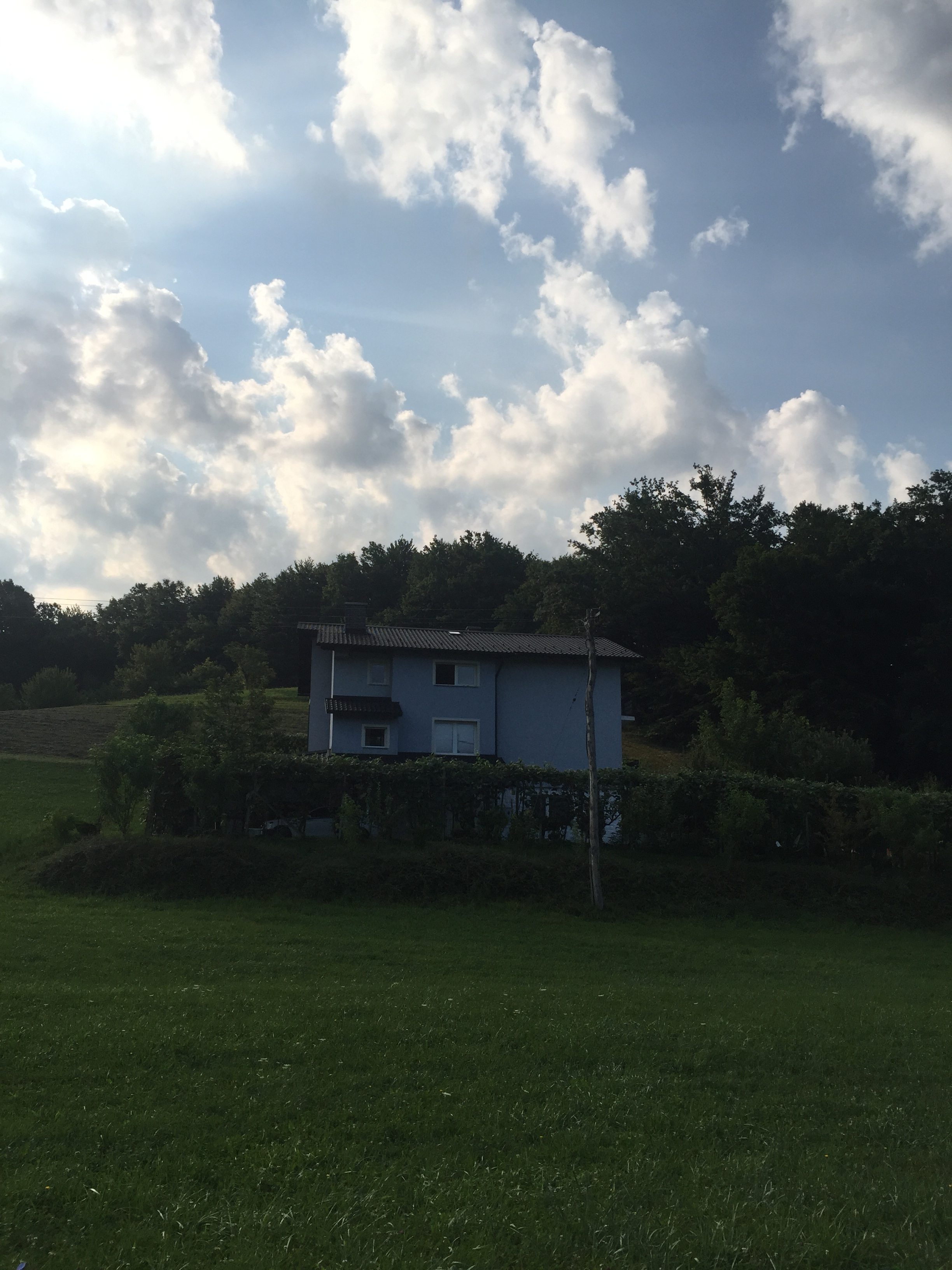 3252 Žahenberc, Slovenia